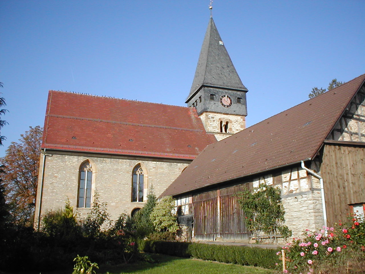 Obere Kirche in Langenbeutingen mit Portal von 1609